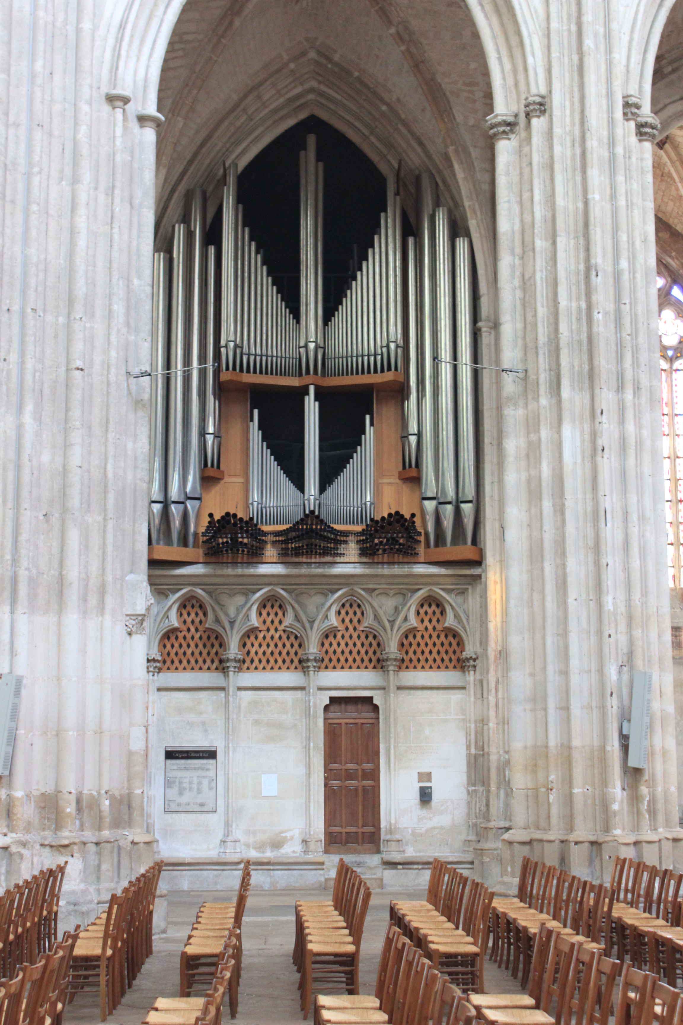 Auxerre, Yonne, Bourgogne, France